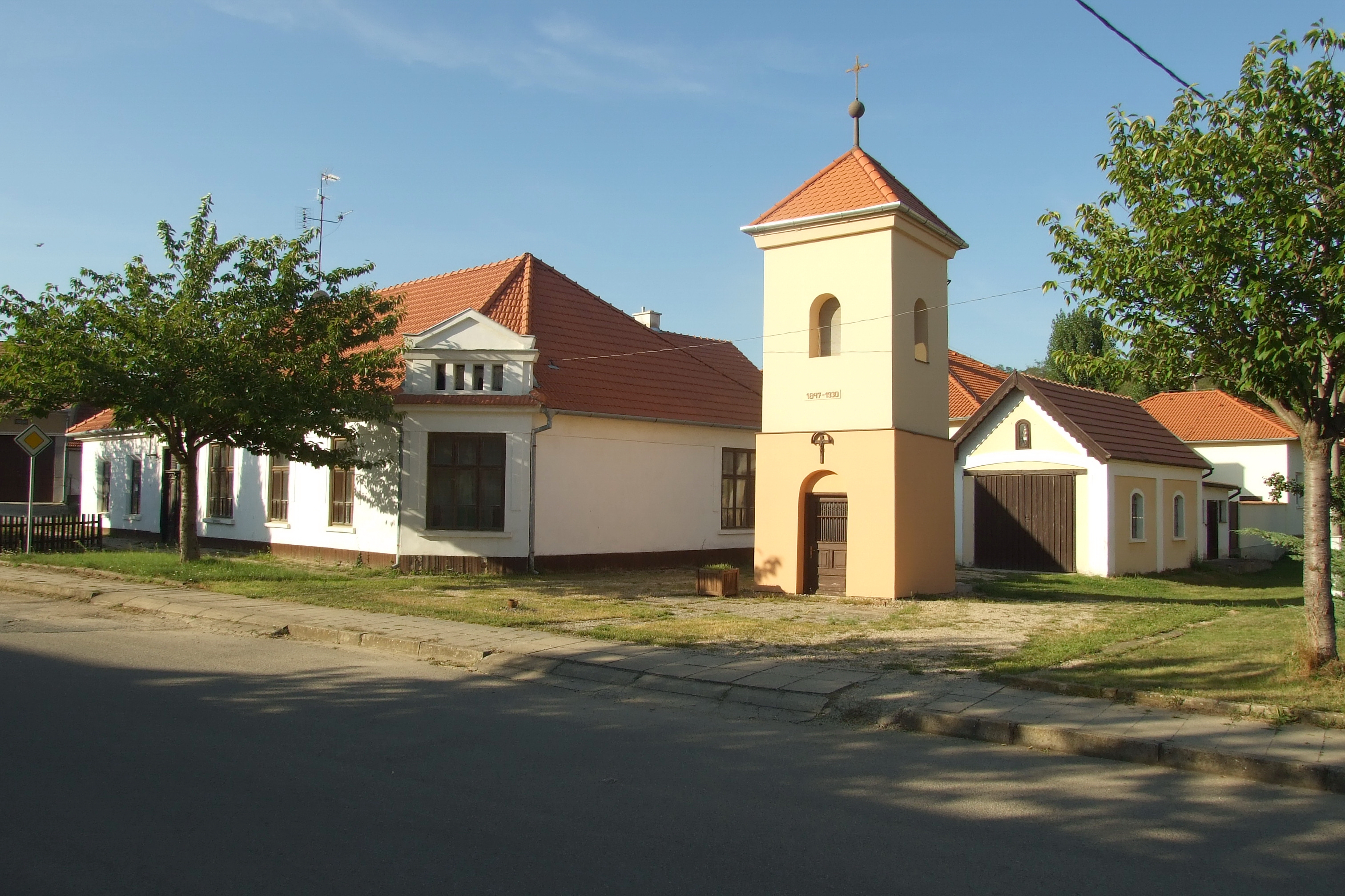 Sobotovice - Bývalá obecní hospoda, zvonička, a bývalá hasičská zbrojnice